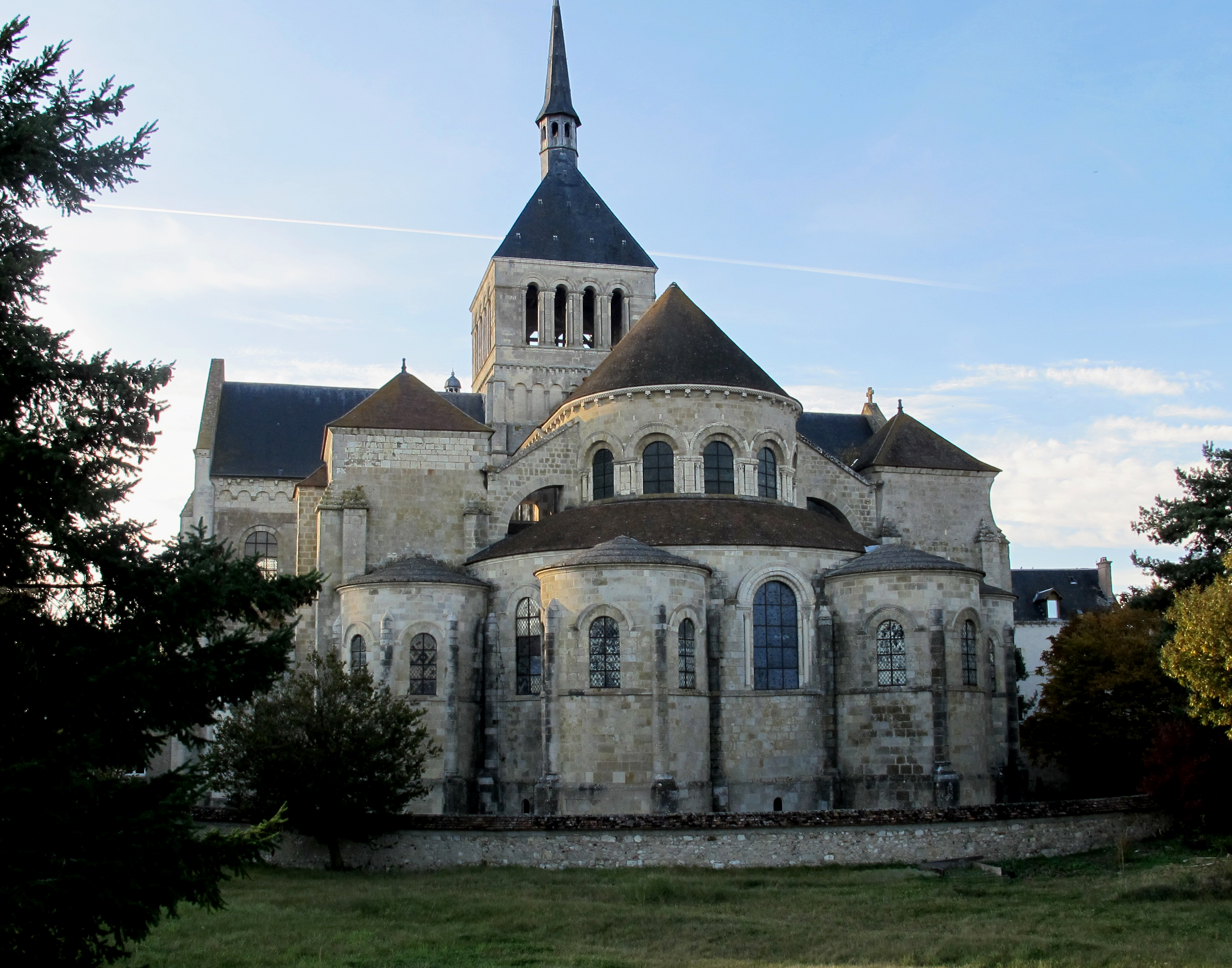 Abbaye de Saint-Benoit-sur-Loire, France